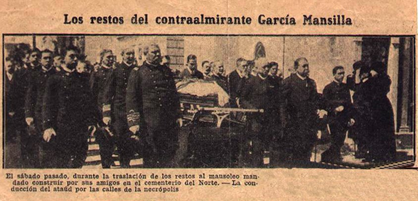 Fotografía de un diario de 1910, notificando de la muerte de Garcia Mansilla.